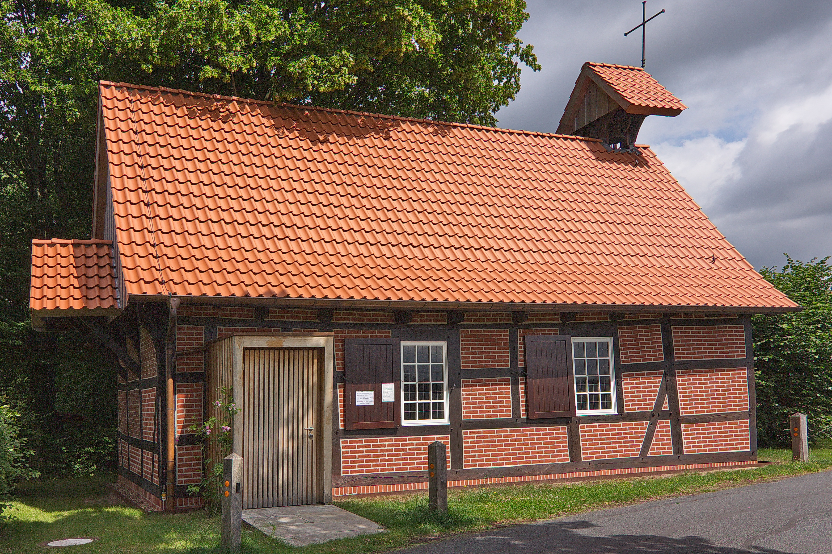 Die Johannes-Kapelle ist eine Fachwerkbau in Metel (Neustadt am Rübenberge), Niedersachsen, Deutschland